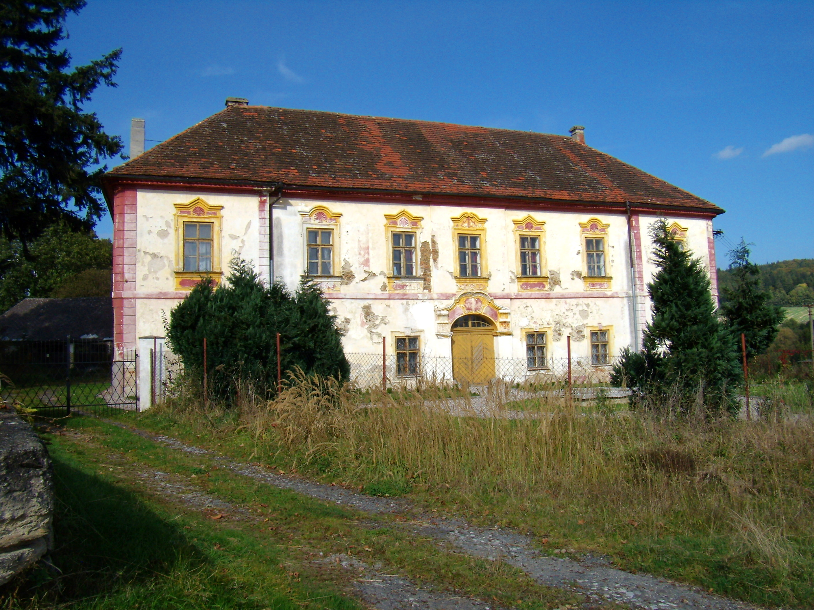 Lovčice - zámek